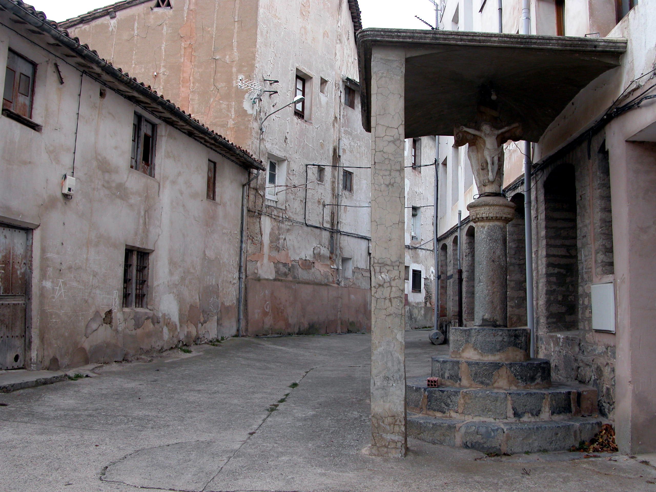 Crucero de Munilla, La Rioja - España.